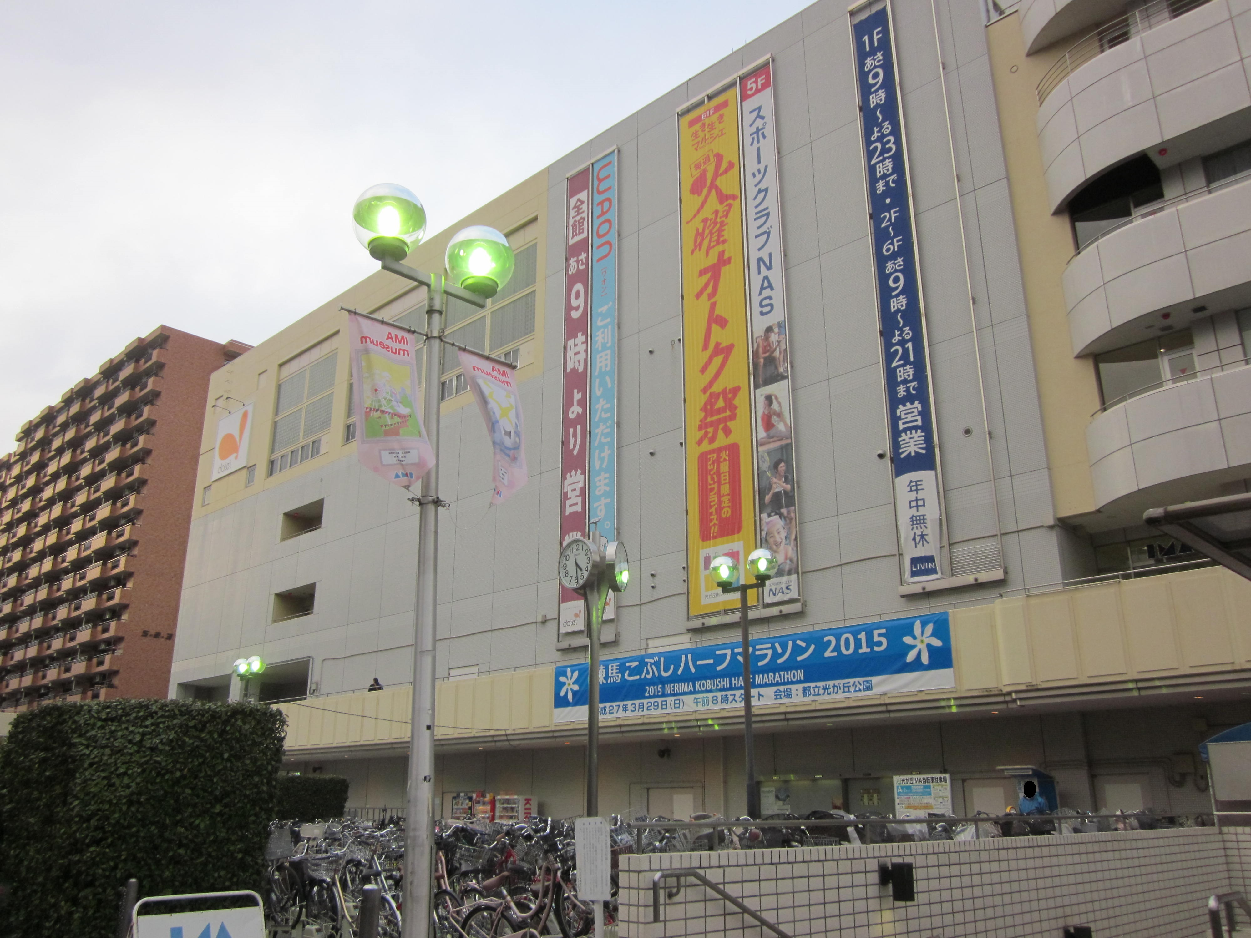 利用者:Ik06が撮影。